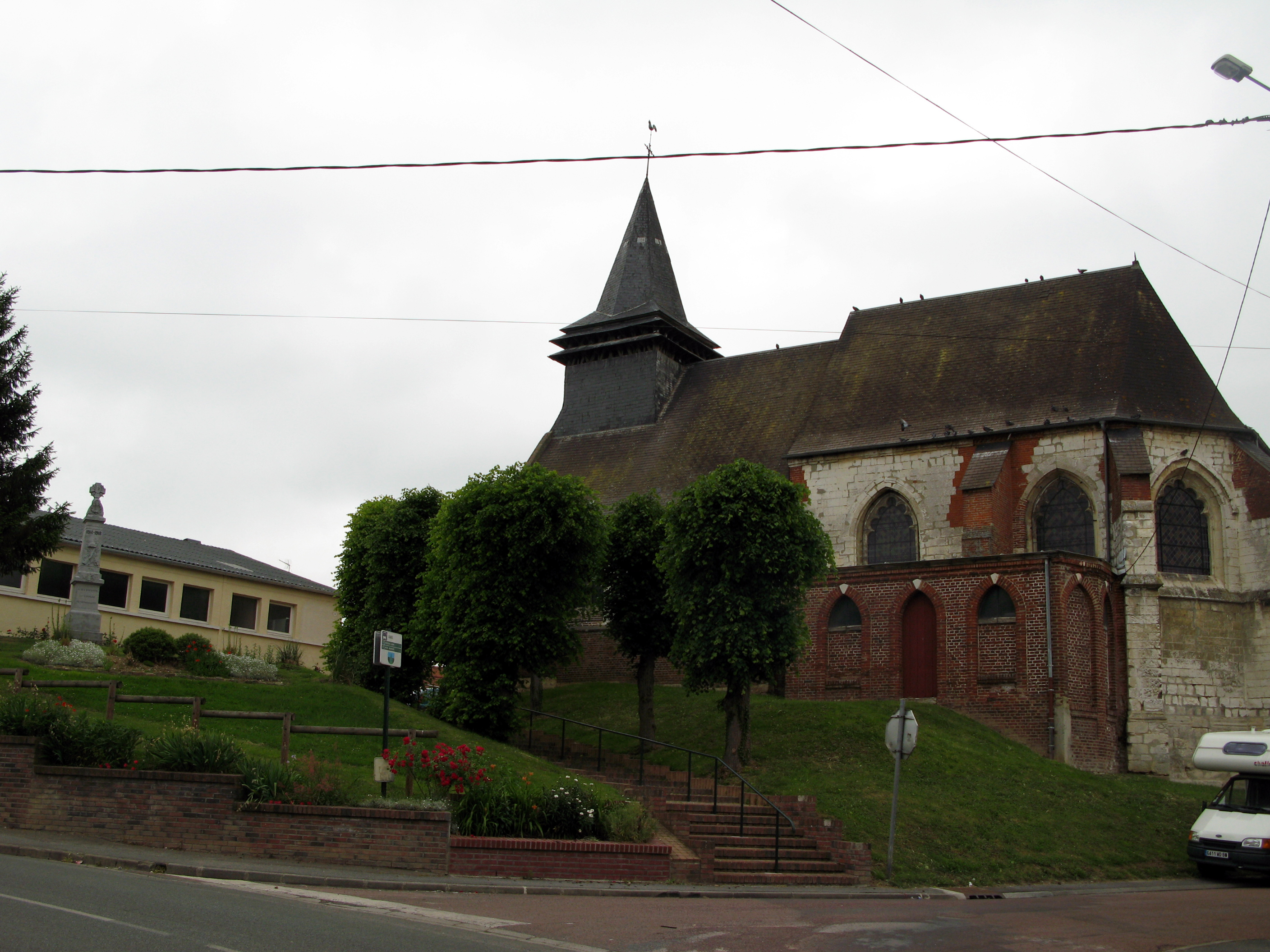 Jumel (Somme, France) - L'église et le Monument-aux-Morts.